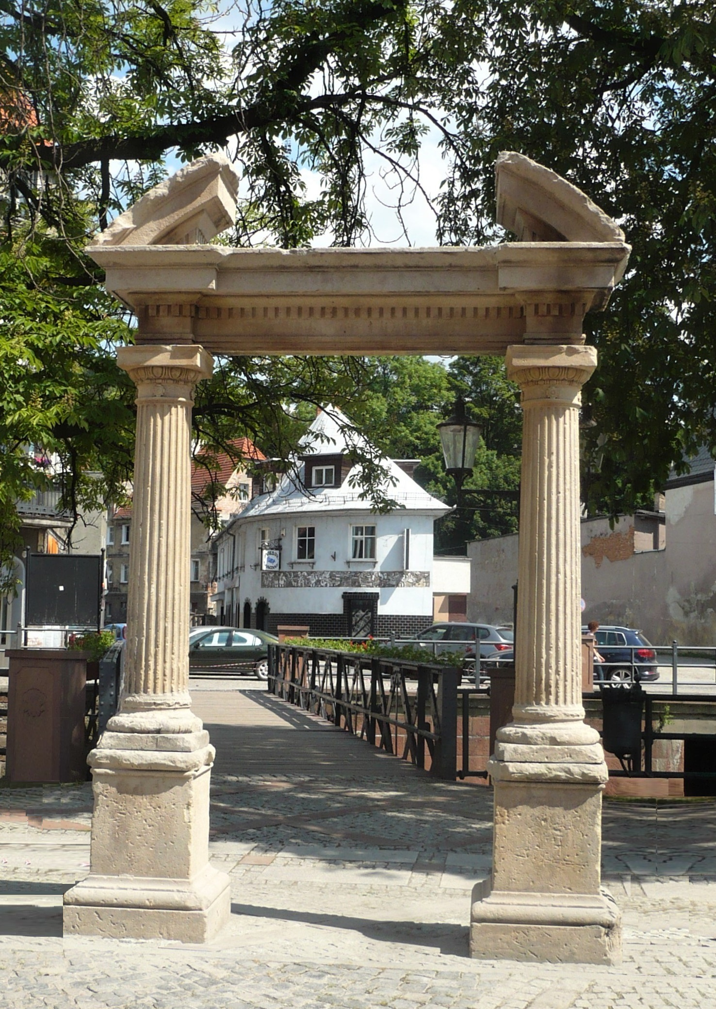 Brama ul. Piastów 19a w Nowej Rudzie